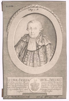 Porträt Ludwig Friedrich von Beutwitz (1726-1796), Jurist. Authority control VIAF: 74950758 GND: 130106666